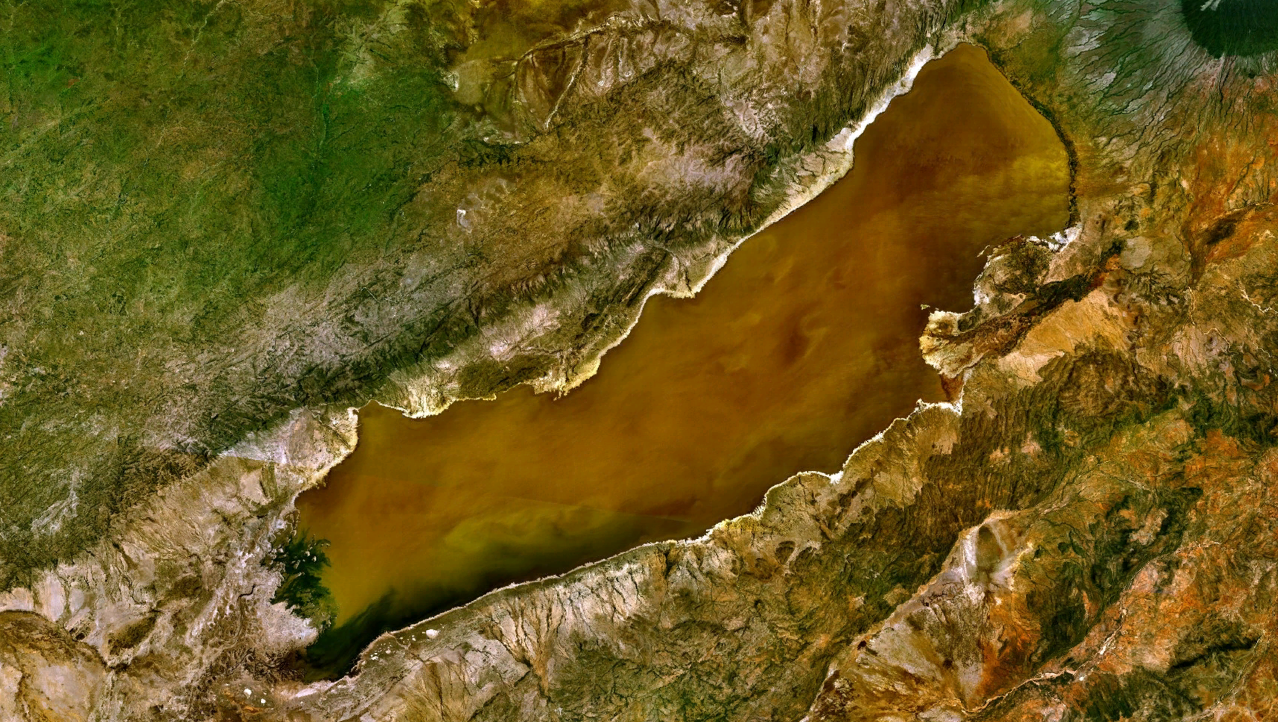 A satellite image of Lake Eyasi in Tanzania.